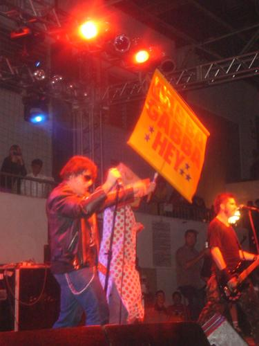 Foto de um Show da banda gaúcha de Punk Rock Tequila Baby com participação especial de Marky Ramone.